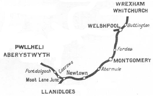 Streckenkarte der Cambrian Rly Bereich Abermule